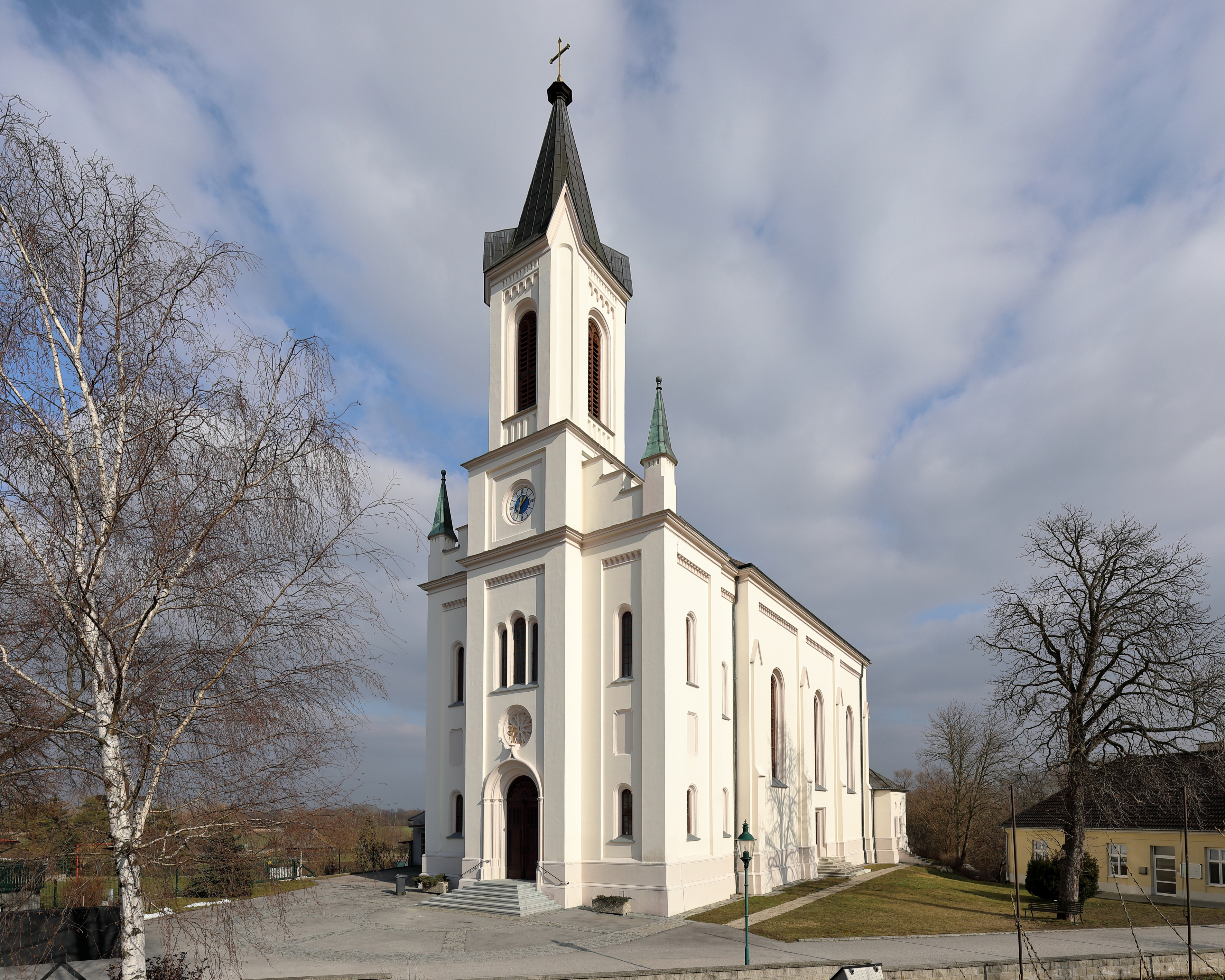 Die röm.-kath. Pfarrkirche hl. Agatha in Mannersdorf, ein Ortsteil der niederösterreichischen Marktgemeinde Angern an der March. Die weithin sichtbare frühhistoristische Kirche wurde 1863 anstelle eines barocken Vorgängerbaues errichtet.